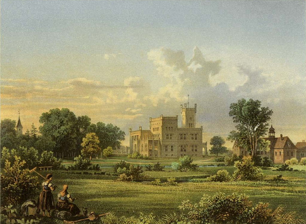 Ansicht von Schedlau, Kreis Falkenberg (Szydłowiec Śląski).